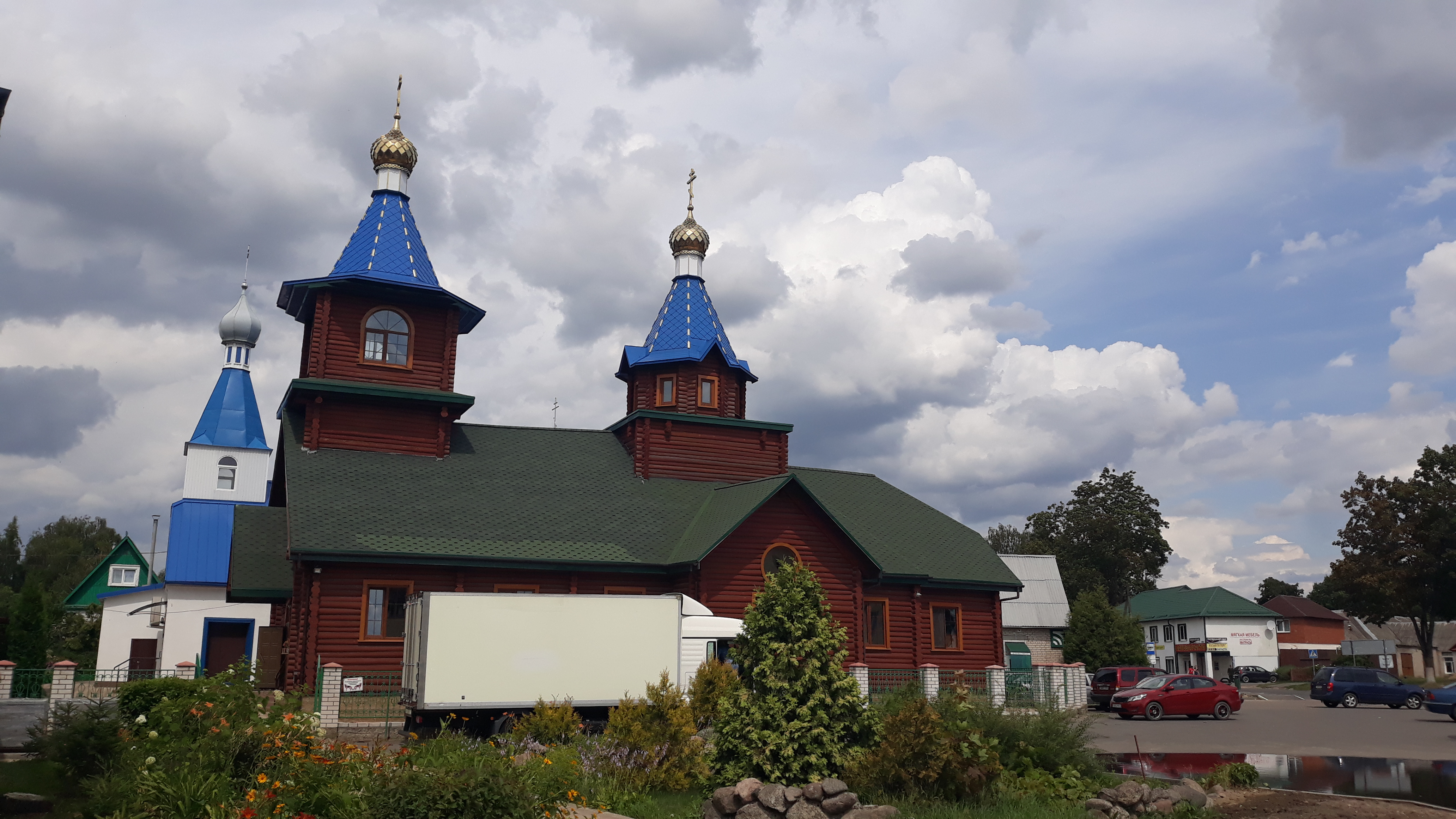 Царква Георгія Перамаганосца